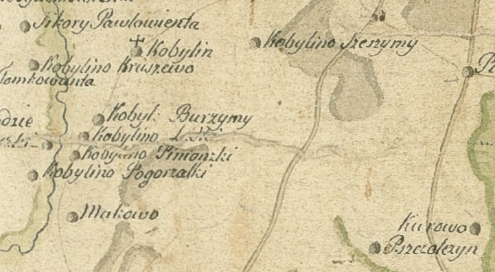 W latach 1795-1807 Kobylin znajdował się w Prusach Nowowschodnich, departamencie białostockim w powiecie suraskim. Jest to fragment mapy z 1804 roku.